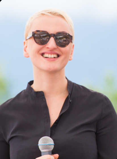 Arisa in concerto a Montjovet, Col d'Arlaz, in Val D'Aosta il 13 luglio 2014